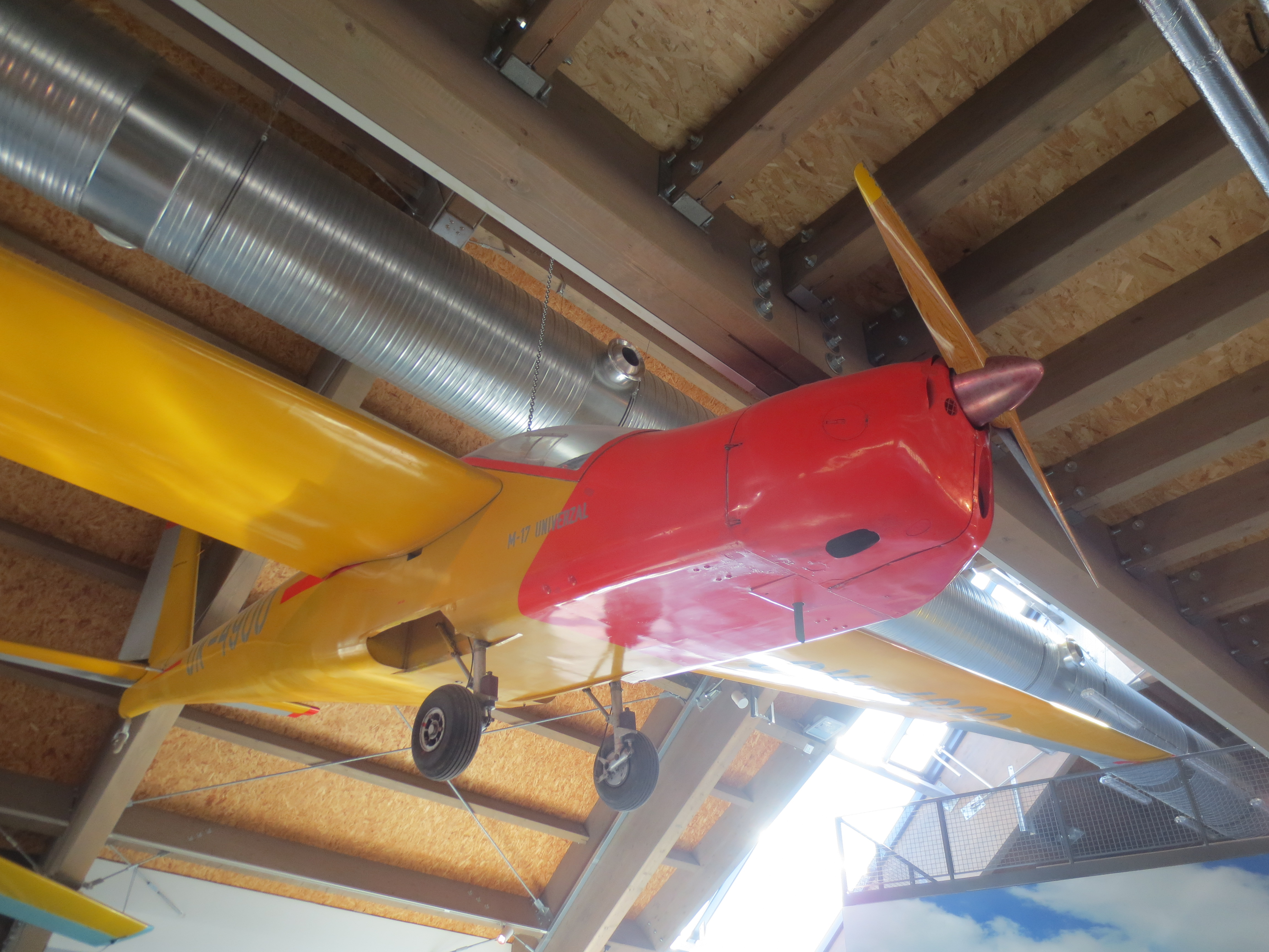 M-17 Universal, Letecké muzeum Metoděje Vlacha, Mladá Boleslav